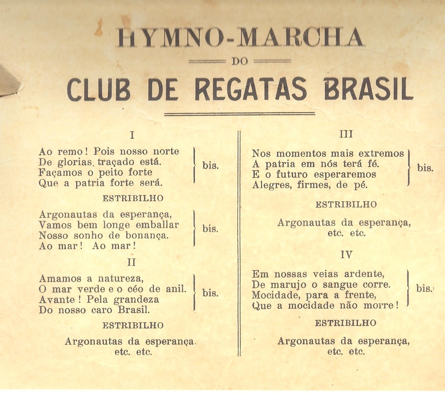 Hino oficial.